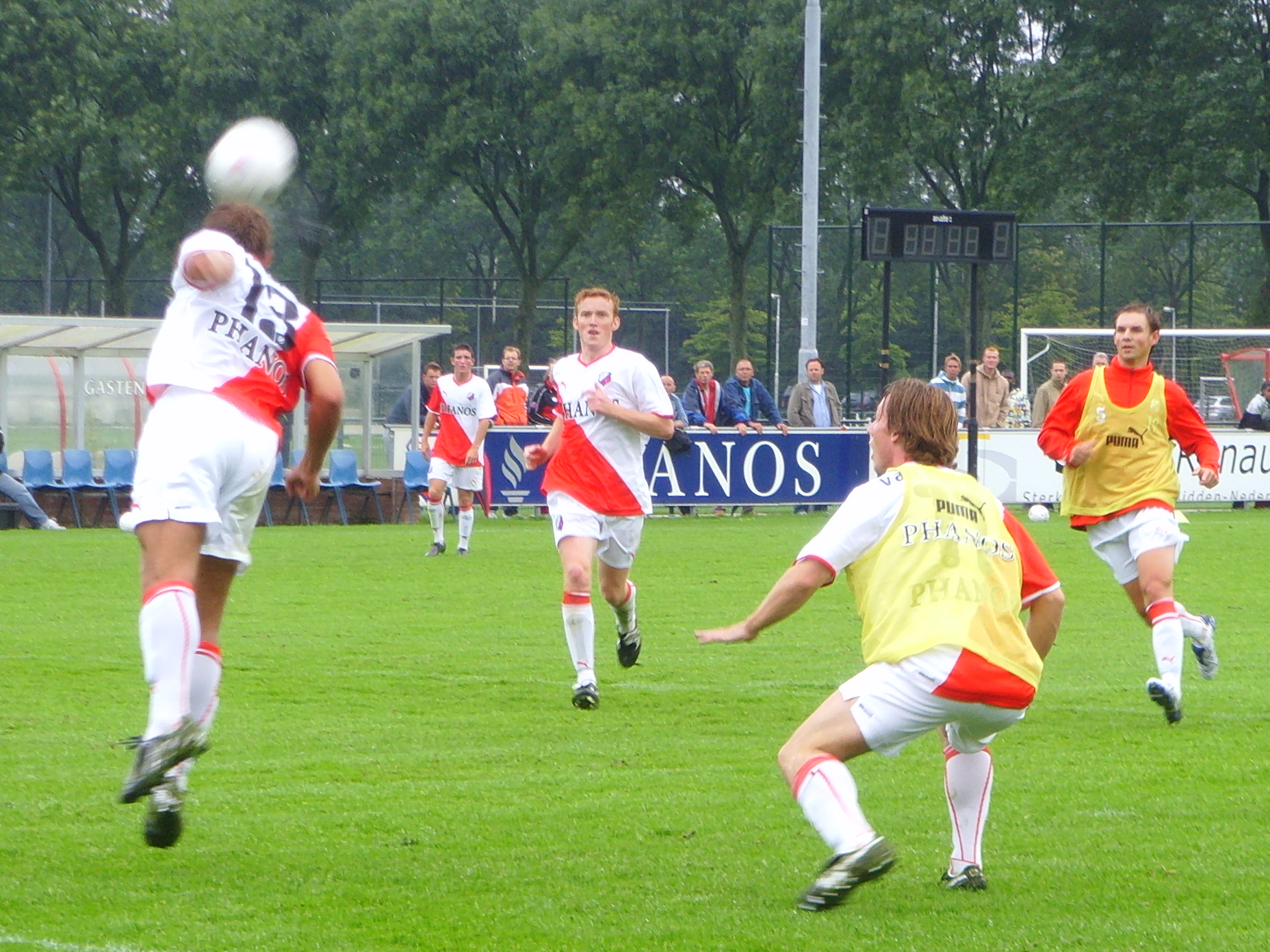 Actiefoto tijdens de eerste training van het seizoen 2008-2009 van FC Utrecht. Van links naar rechts Mike van der Kooy, Hans Somers, Cedric van der Gun, Kevin Vandenbergh